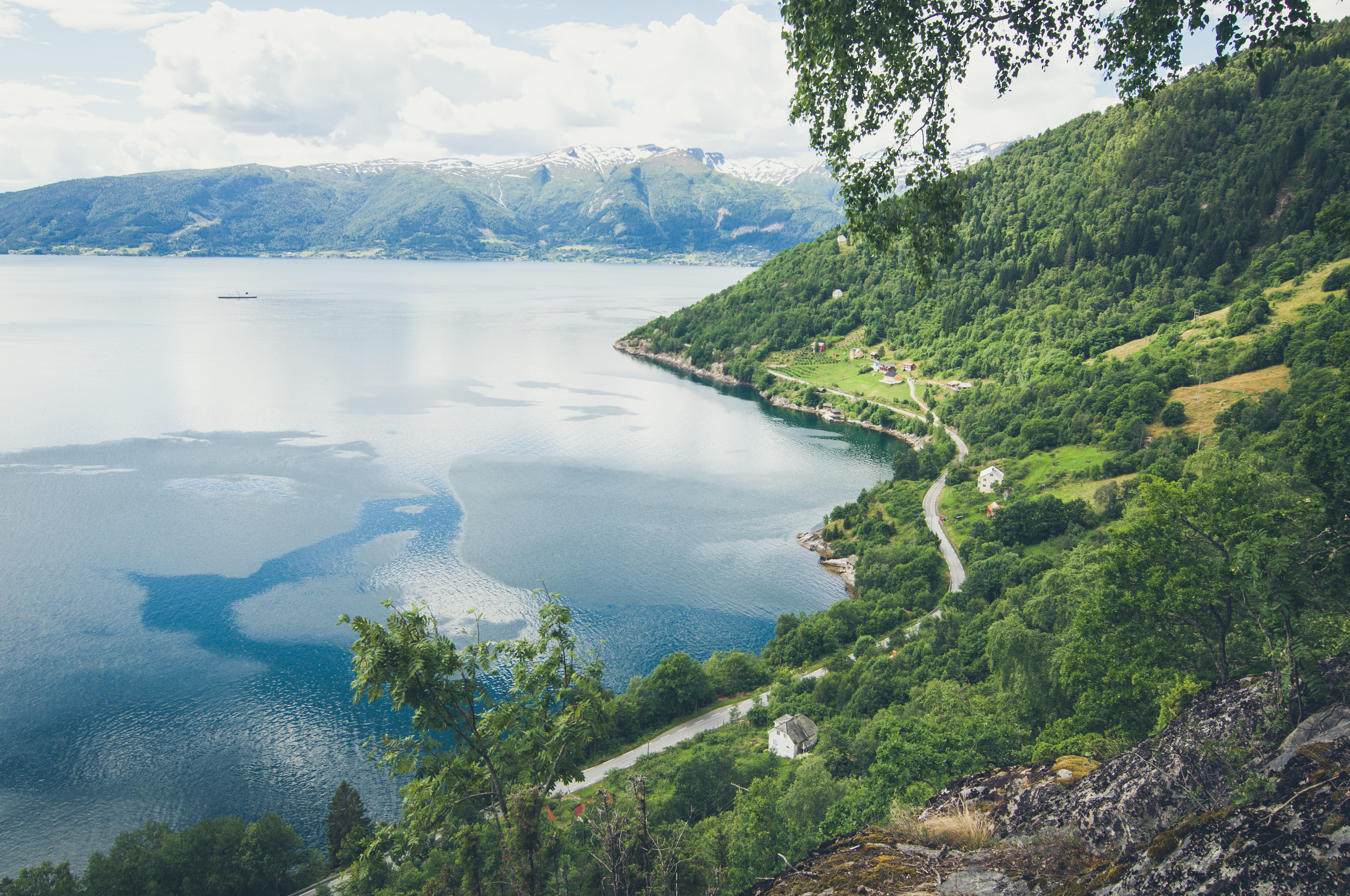 Eitorn i Leikanger